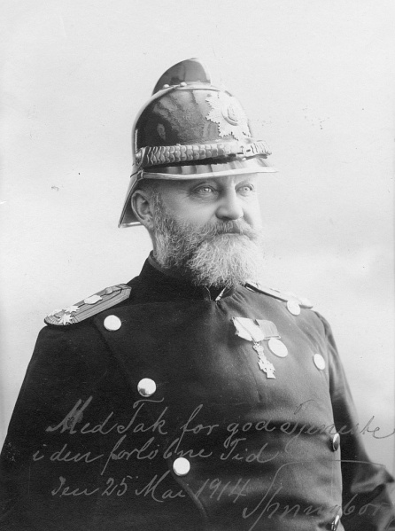 Brand- og bygningsinspektør Eduard Ludvig Frederik Springborg, fotograf